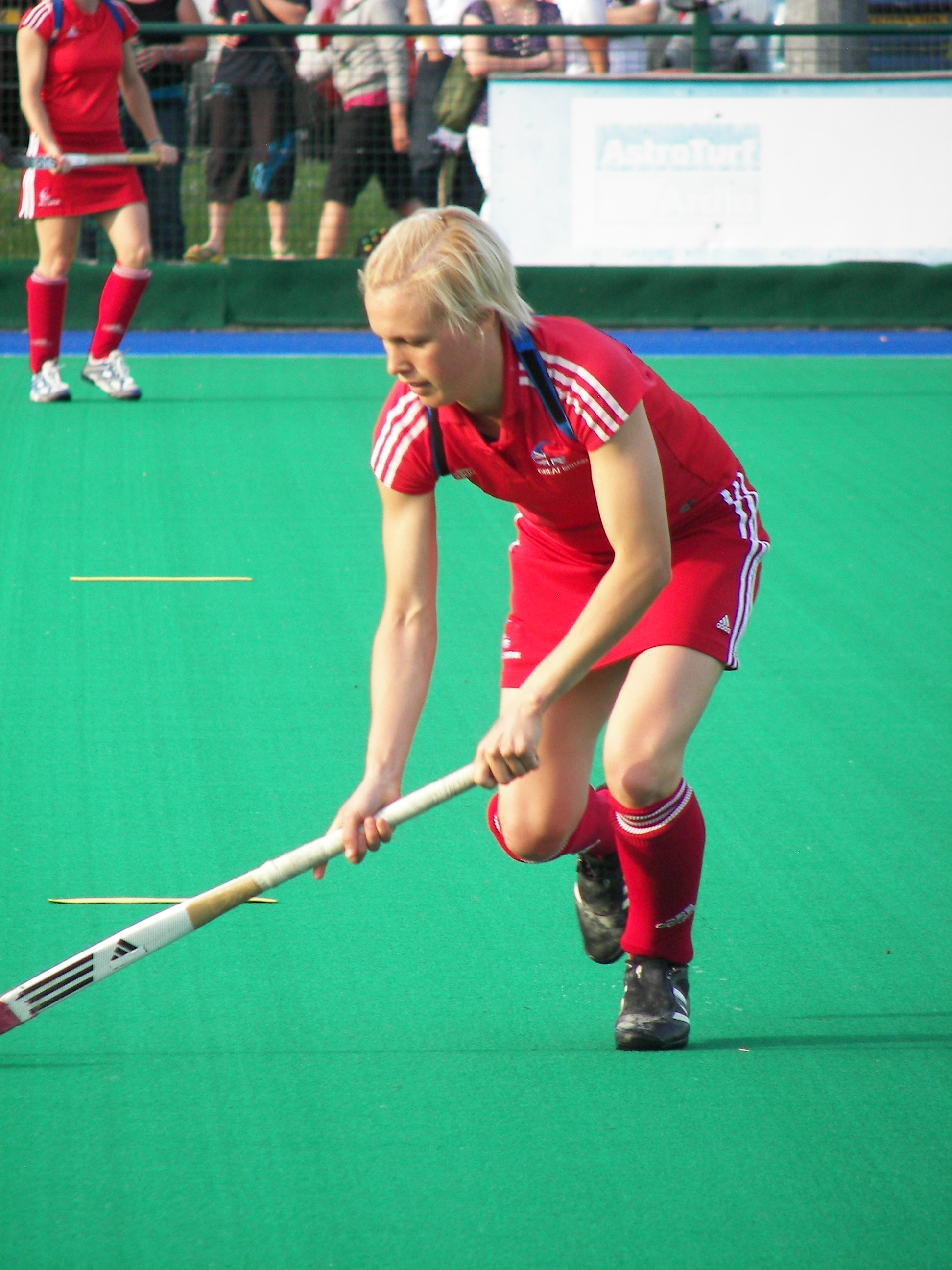 Alex Danson